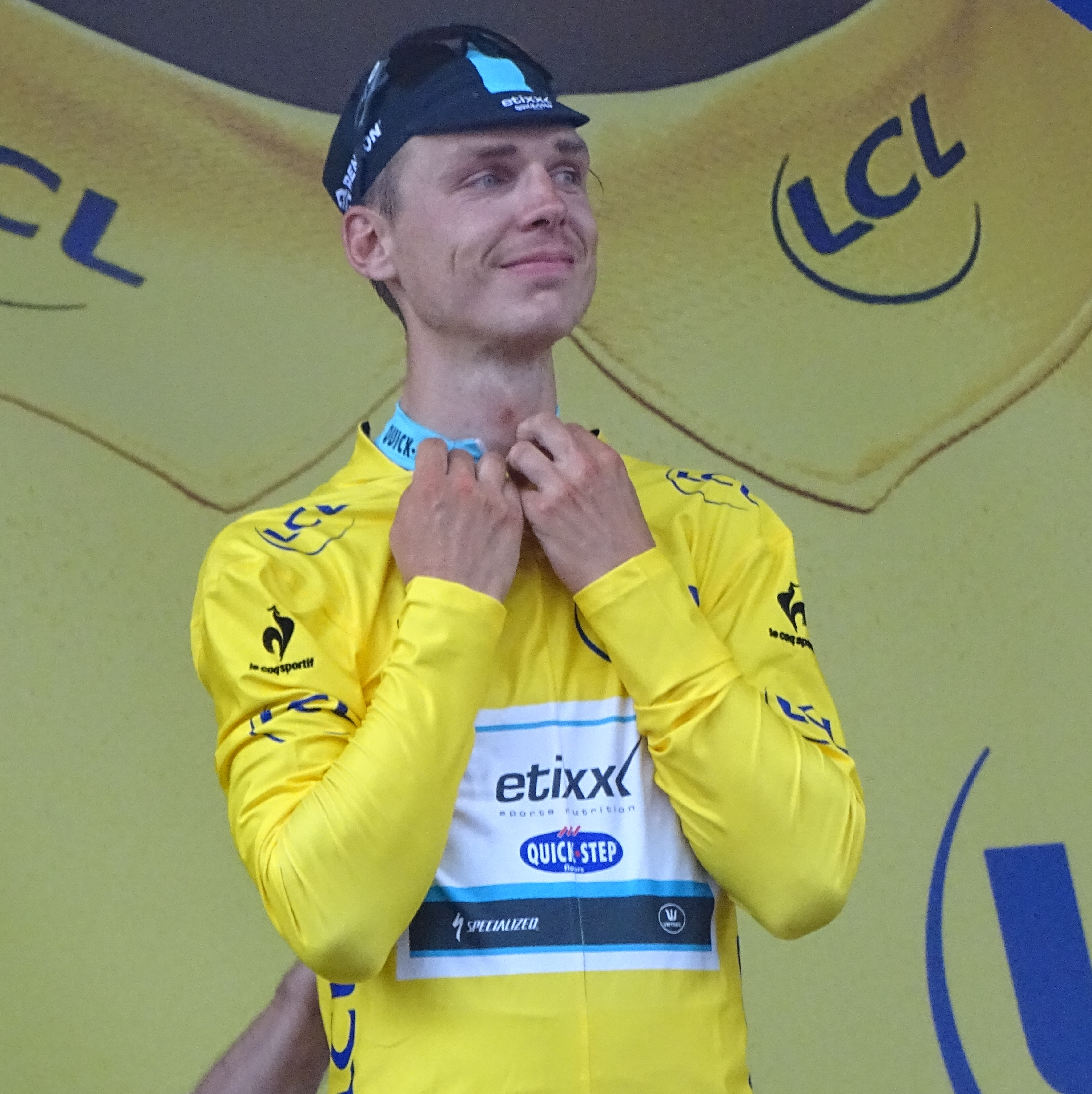 Reportage réalisé le mardi 7 juillet à l'occasion de l'arrivée de la quatrième étape du Tour de France 2015 à Cambrai, Nord-Pas-de-Calais, France.